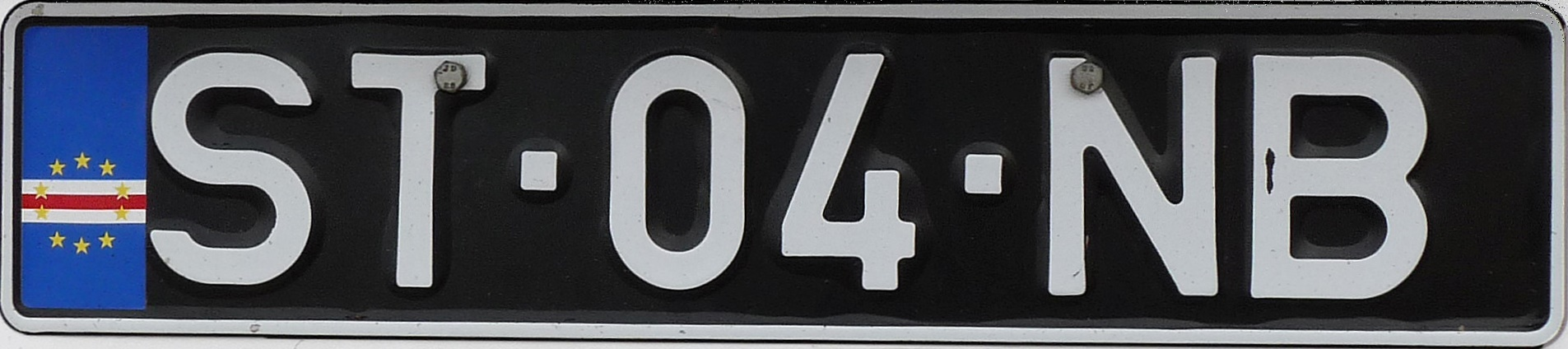 Plaque d'immatriculation de Santiago (Cap-Vert)